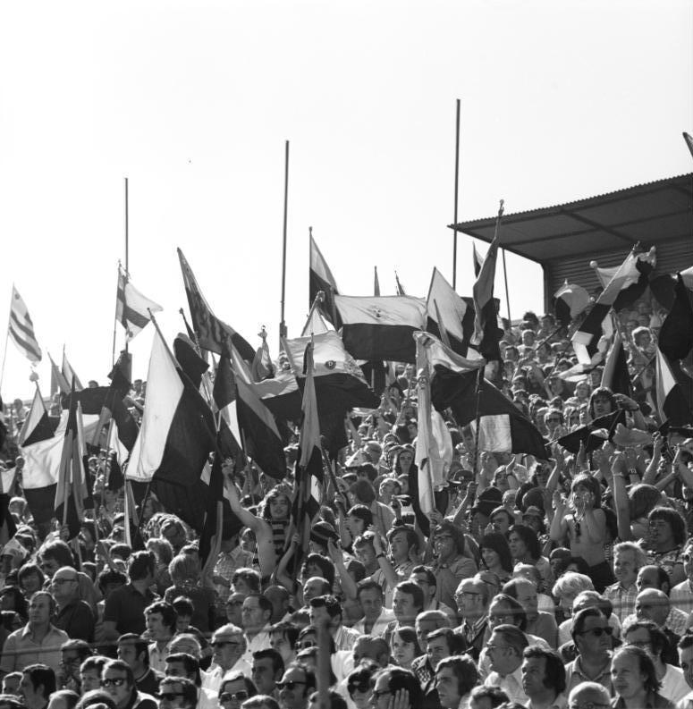 ADN-Zb/Häßler/8.5.76 Dresden: Die Begeisterung der Elbstädter gehörte ihrer Mannschaft, dem Dynamo Dresden, nach dem klaren Sieg der Dresdener über den FC C.Z. Jena. Der Dynamo Dresden wurde am 8.5.76 neuer DDR Fußballmeister.